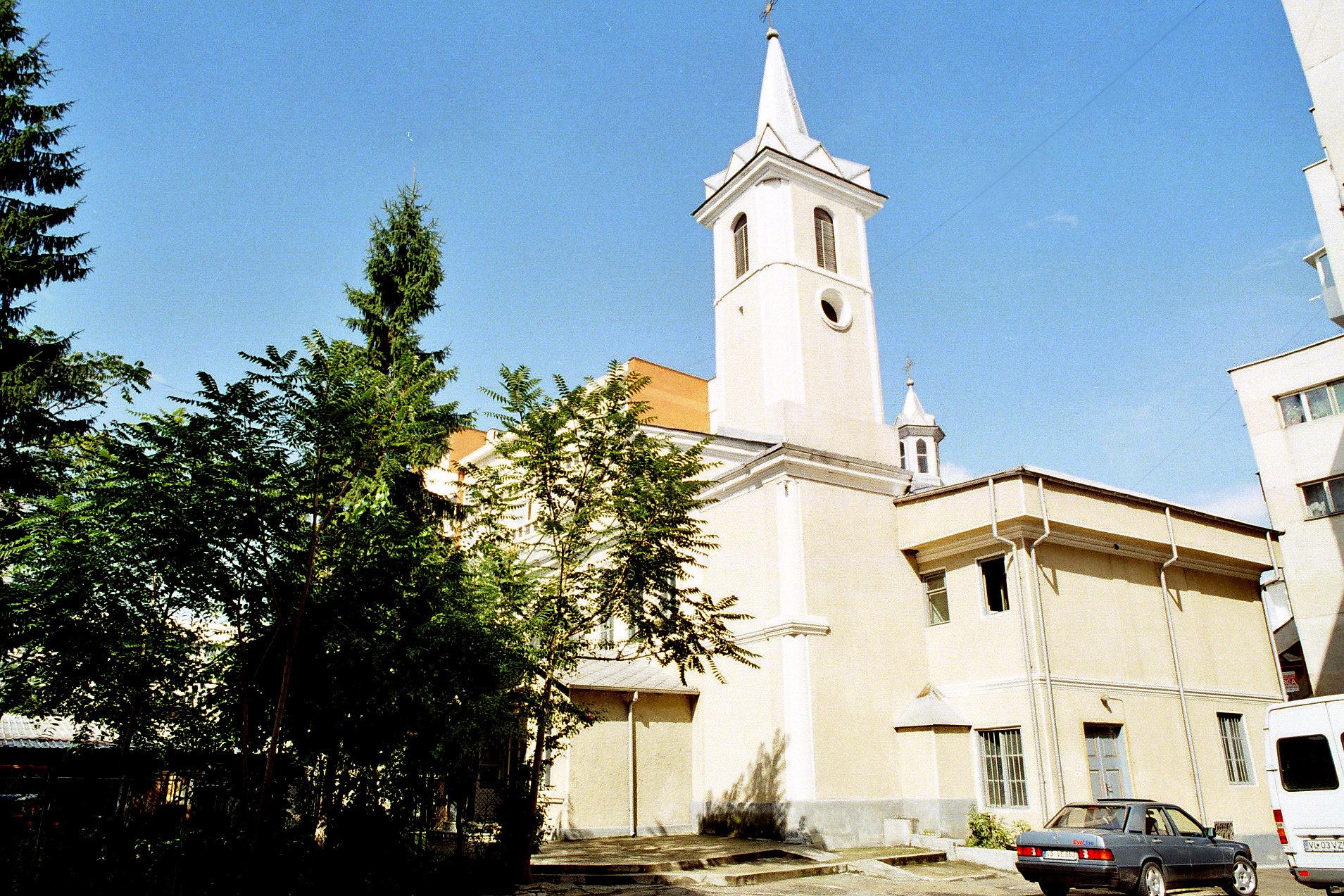 Biserica romano-catolică „Sf. Anton din Padova”